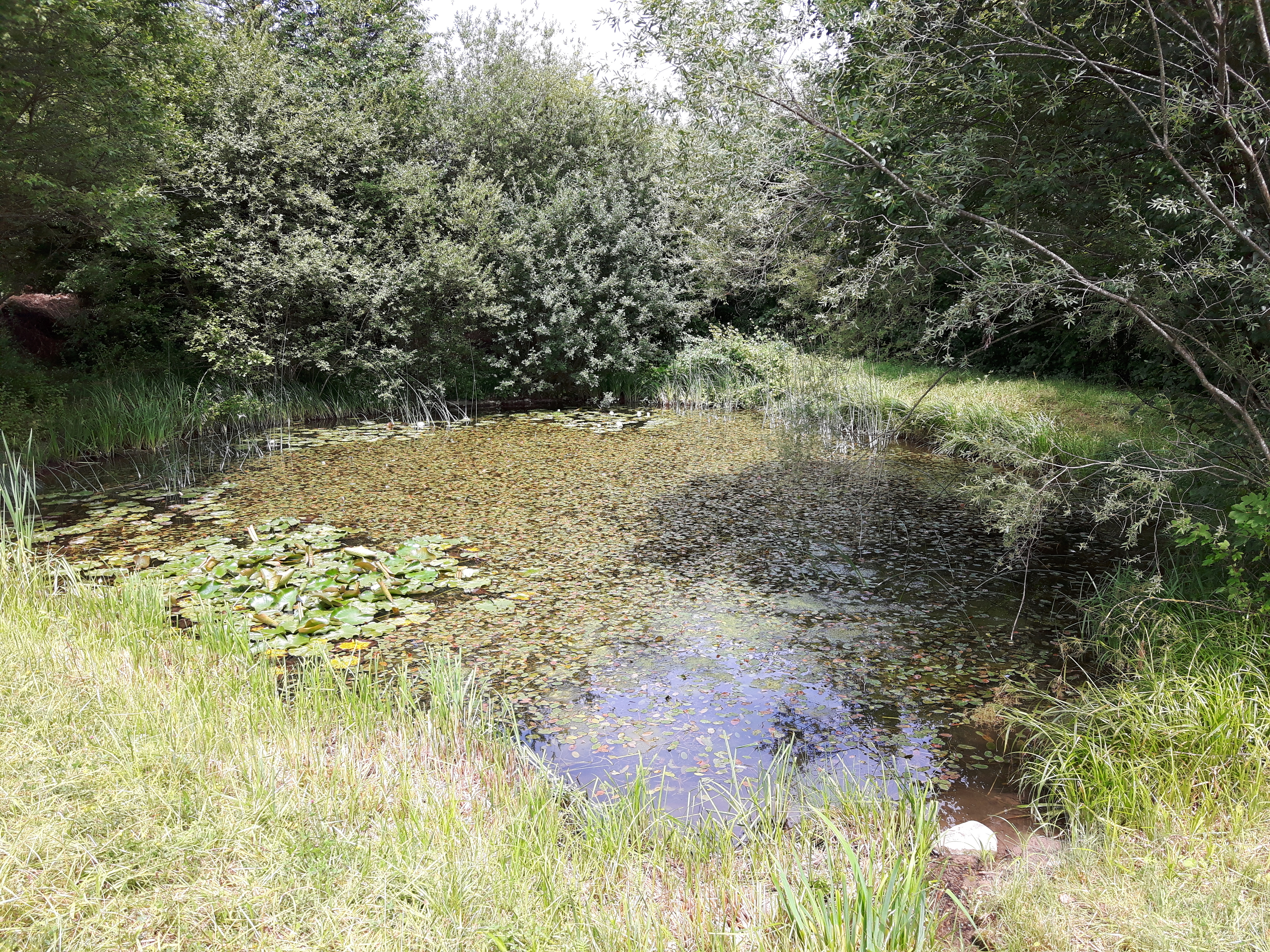 Vom Allmendbach gespeister Teich direkt neben dem Bollweiher in der Gemeinde Urdorf, Kanton Zürich